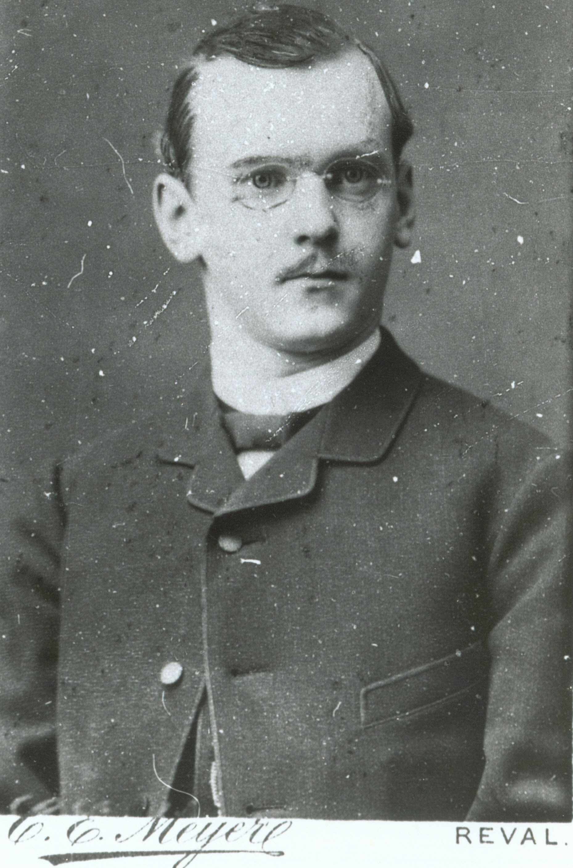 Porträt-Foto des Bankiers Edgar Hoeppener ca. 1890 im kaiserlich-russischen Reval